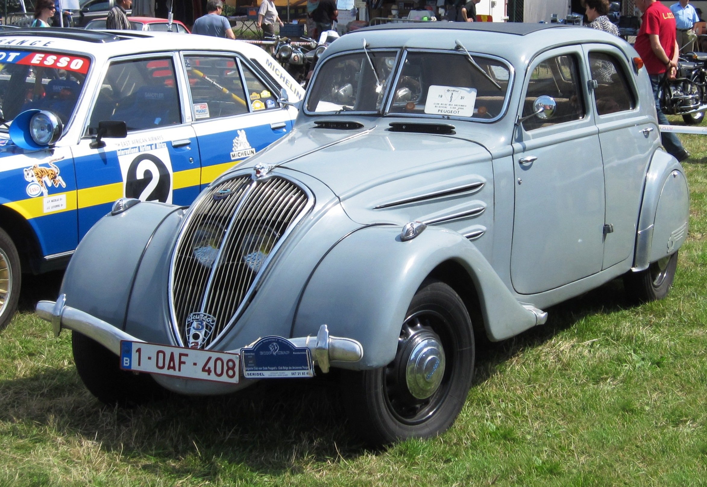 Peugeot 302 en Belgique